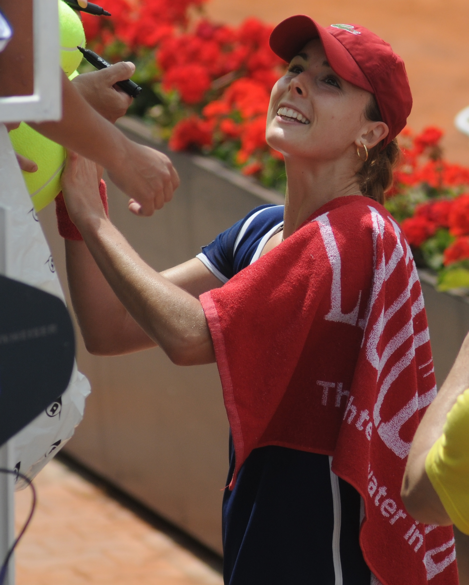 Alizé Cornet at the 2014 Internazionali BNL d'Italia